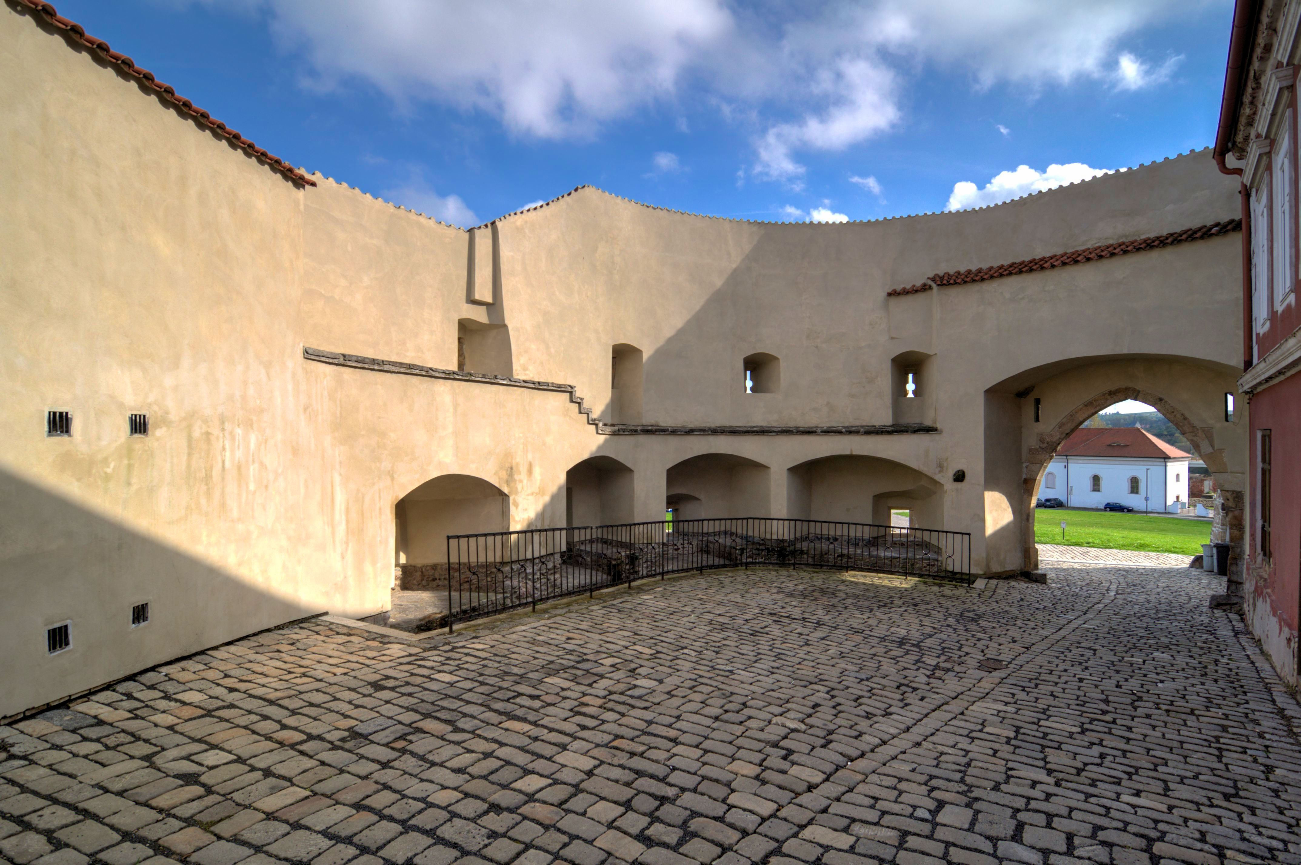 Městské opevnění, Kadaň.